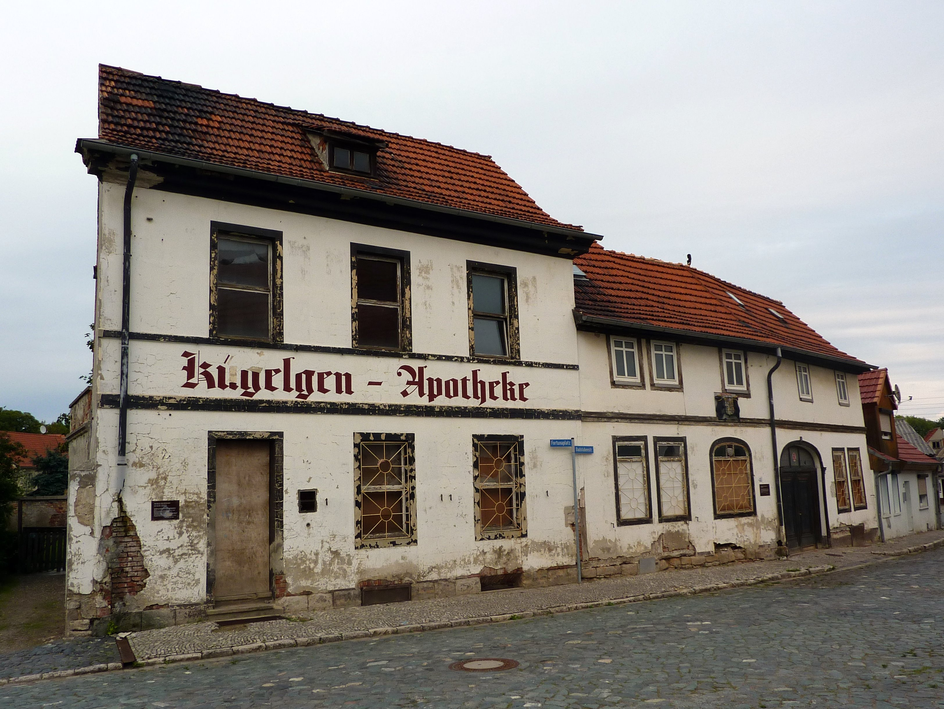 Die ehemalige Apotheke steht unter Denkmalschutz und zum Verkauf.